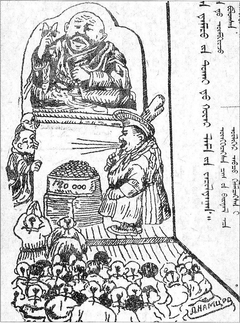 Антибуддийская карикатура. Журнал «Эрдэм ба шажан» (Наука и религия, 1928) С 1928 г. в Верхнеудинске началось издание журнала на бурятском языке «Эрдэм ба шажан» («Наука и религия») - центральный орган Республиканского Союза безбожников Бурят-Монгольской АССР. В 1928 г. вышло 3 номера журнала, в 1929 г. — 6 номеров, в 1930 и 1931 гг. — по 9 номеров, в 1932 г. — 5 номеров, в 1934 г. — 2 номера. Организатором и первым редактором журнала был Бато-Далай Тогмитов (1905 или 1906 -1938), работавший в то время научным сотрудником ученого комитета республики. По существу Тогмитов стал одним из первых журналистов республики.